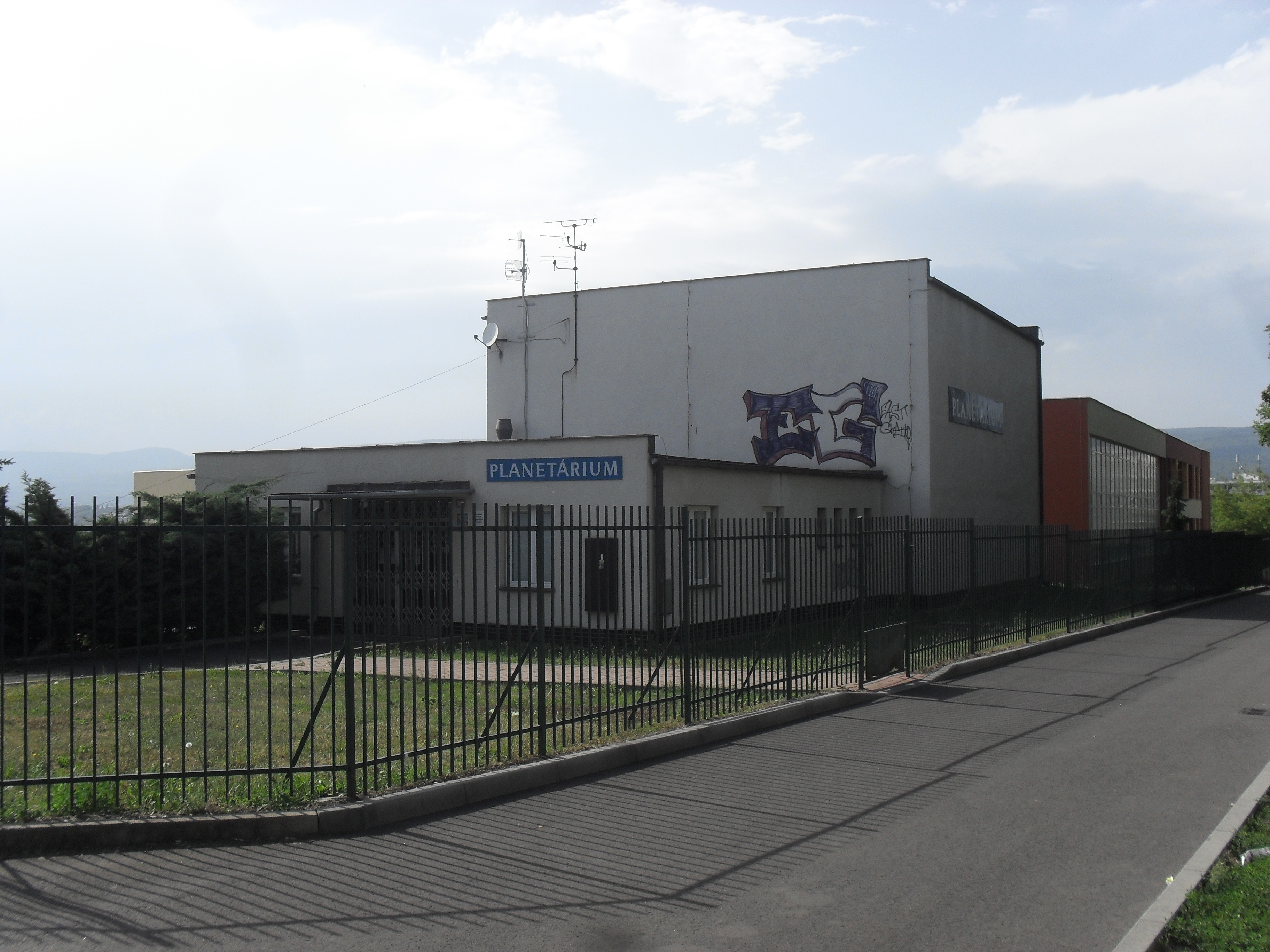 Teplické planetárium je jako jedno z mála na světě vybaveno projekčním planetáriem ZKP2.